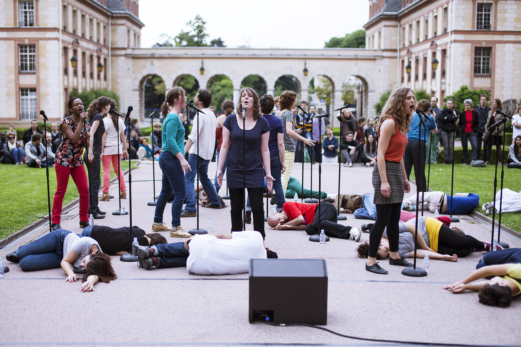 Le groupe de création Groupenfonction investit le parvis de la Maison internationale pour la performance "We Can be Heroes", où une trentaine de volontaires interprètent en playback des chansons, pendant le Week-end international à la Cité #5.